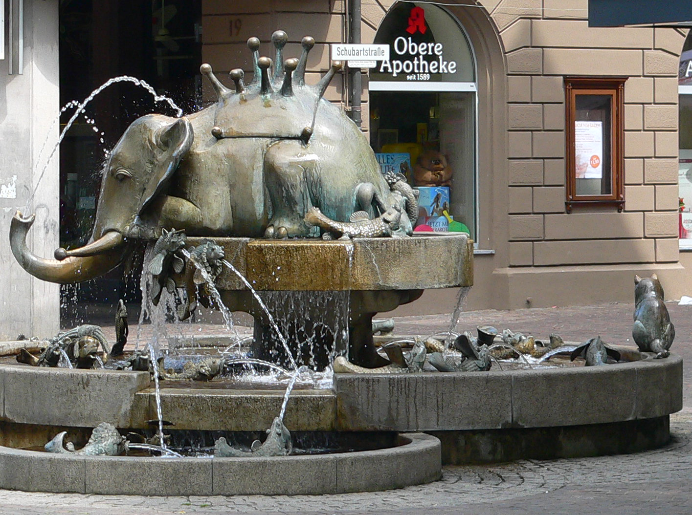 Forellenbrunnen neben dem Alten Rathaus (Detail), Geislingen an der Steige, Deutschland